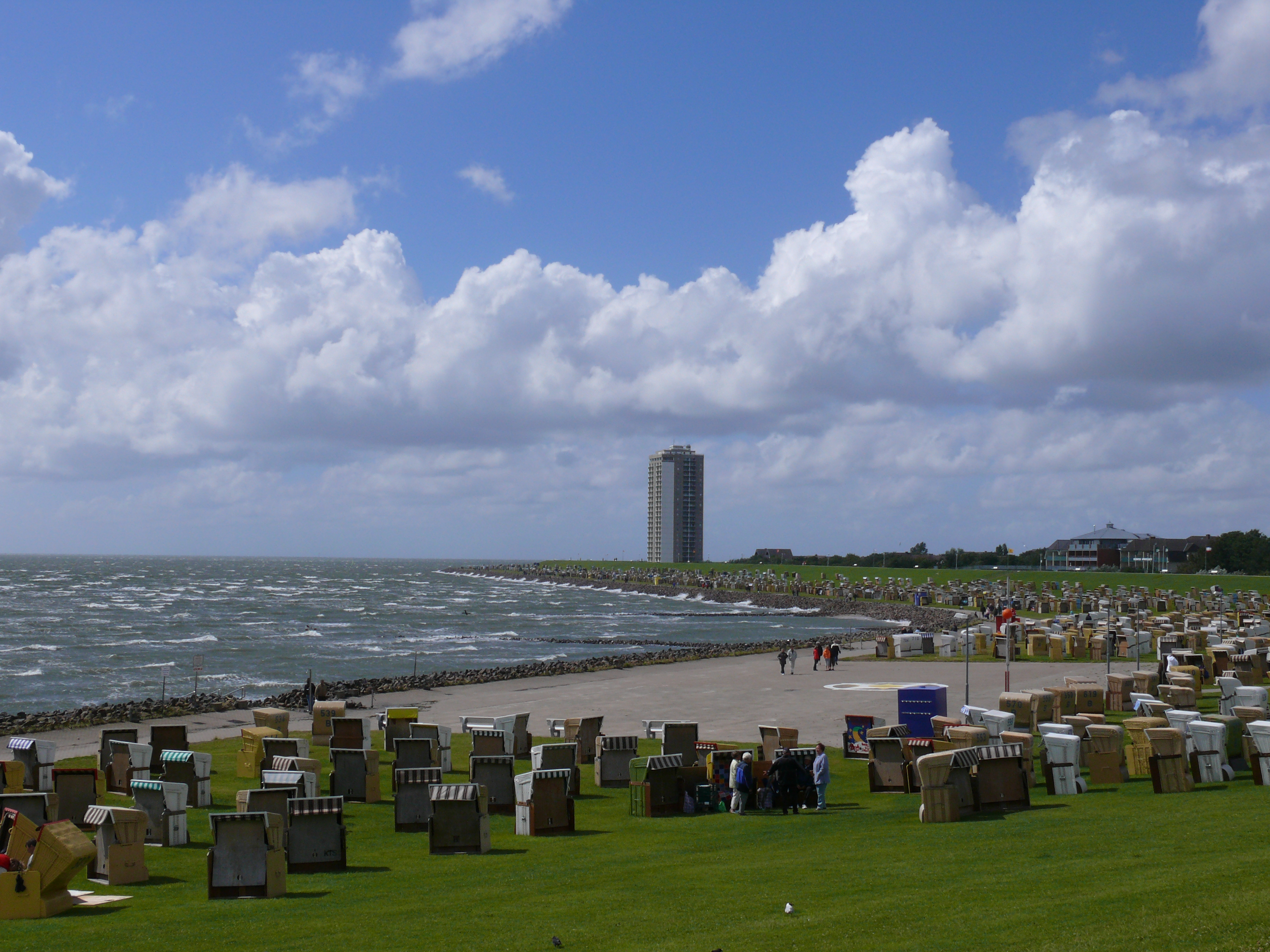 Büsum, 2007